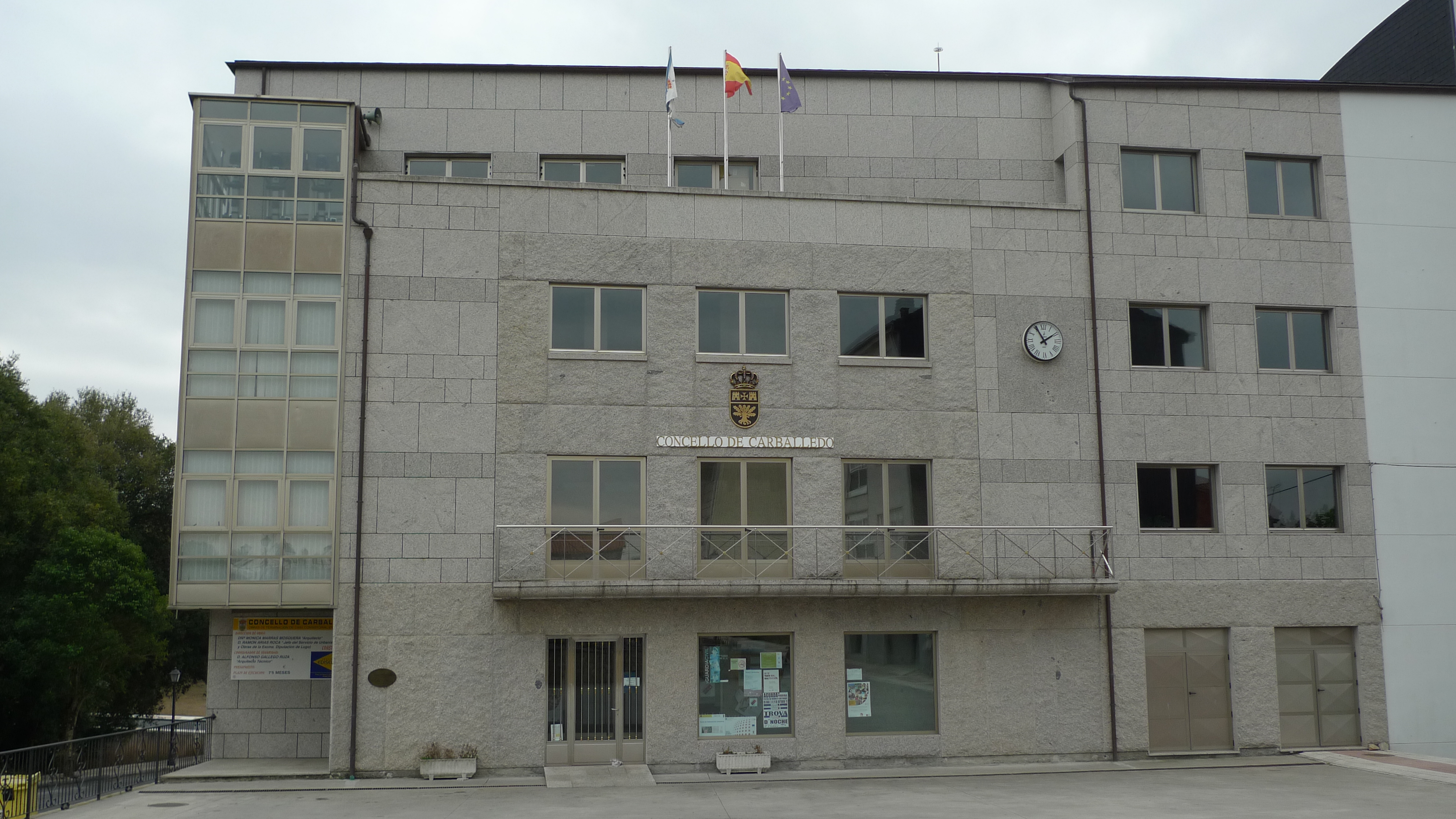 Casa do concello Carballedo (Lugo)